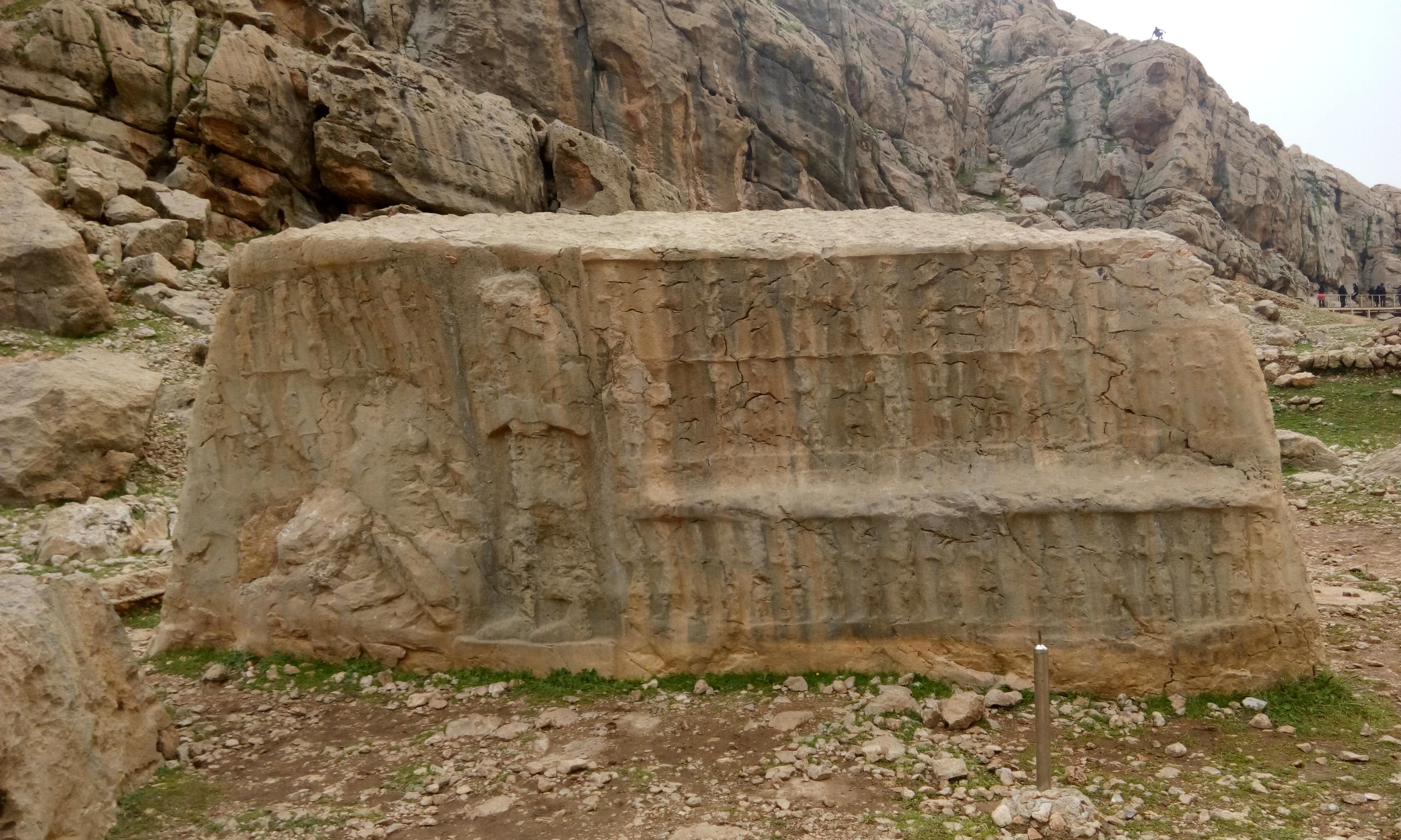 تپه کول فرح